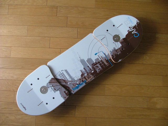 highland cartel56 (表)